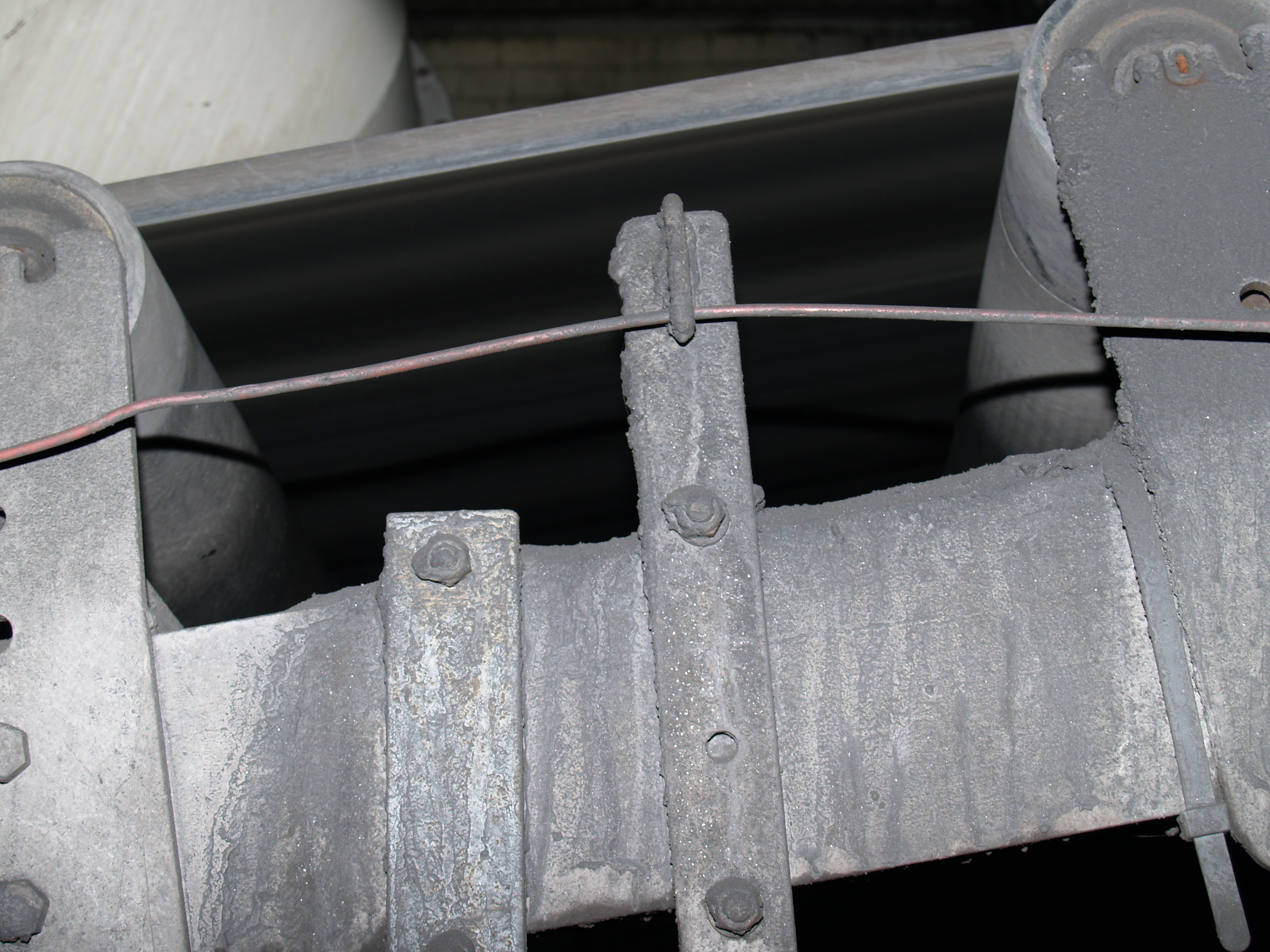 das 35mm dicke Förderband auf den Tragrollen im Bandberg auf der Zeche Prosper-Haniel in Bottrop